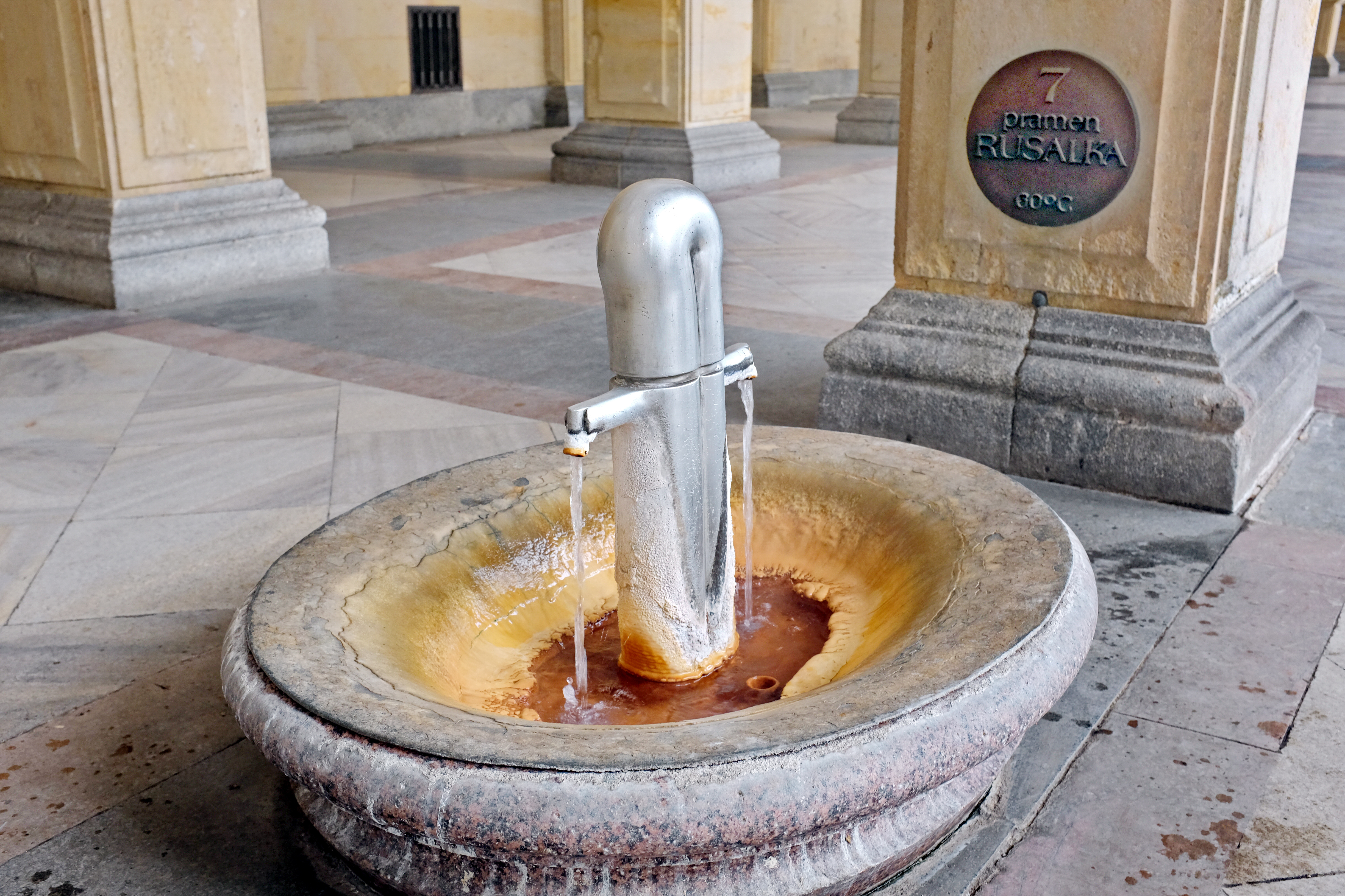 Karlovy Vary, pramen Rusalka